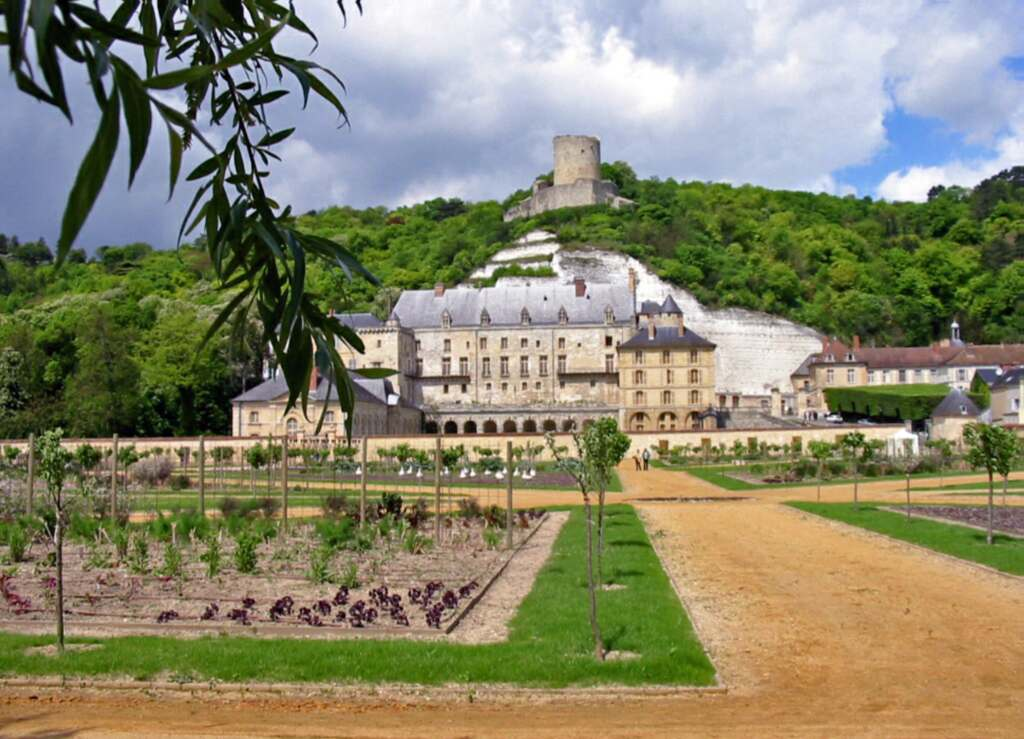 Potager du château de La Roche-Guyon (Val-d'Oise) en 2005, vu du sud; au fond le château surmonté du donjon